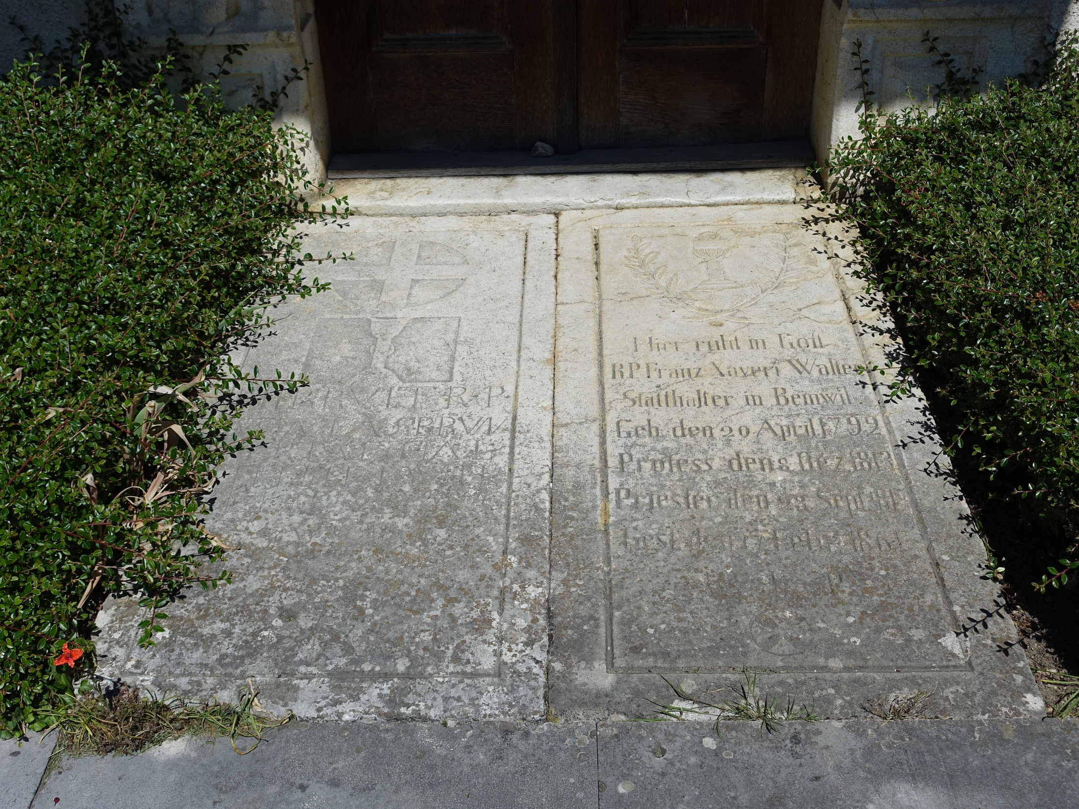 Franz Xaveri Walter (20. April 1792–17. Februar 1861), Professor, Priester und Stadthalter in Beinwil. Grab, St.-Johannes-Kapelle des Klosters Beinwil, Solothurn, Schweiz